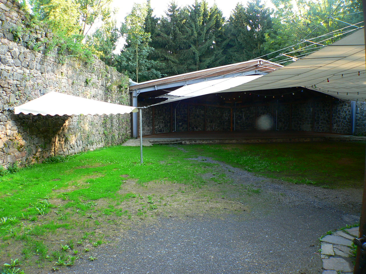 Burgruine Sichelnstein, Gemeinde Staufenberg, Niedersachsen, Germany - Innenansicht mit Freilichtbühne